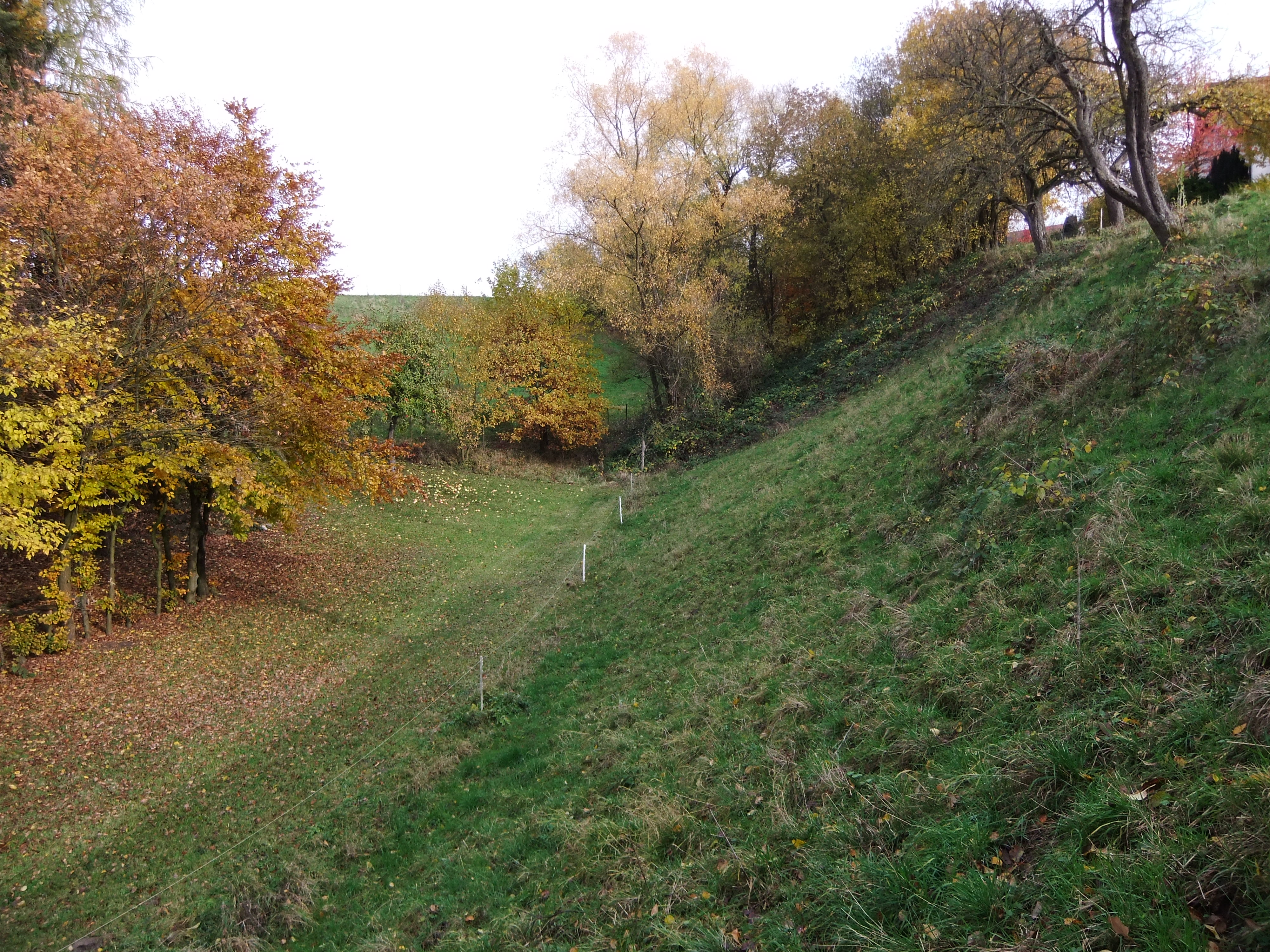 Rappach, Schindersklinge Endbereich